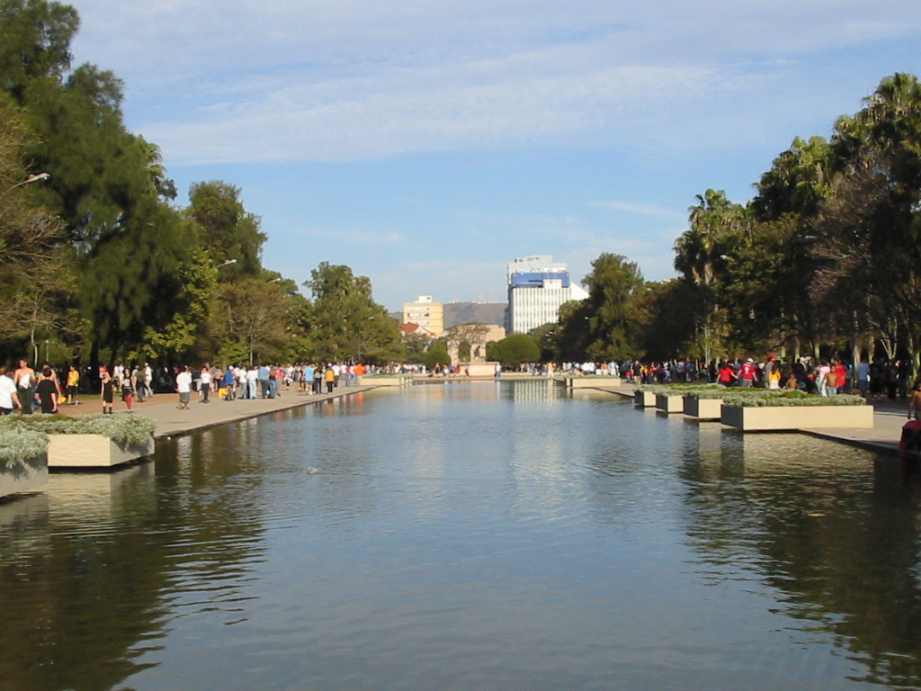 20 de julho de 2003: Parque Farroupilha, o popular "da Redenção".